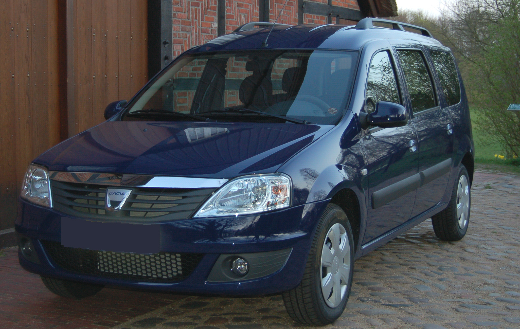 Dacia Logan MCV Lauréate Marine-Blau Model 2009 Die Front besitz größere Scheinwerfer und einen breiteren Kühlergrill mit neuem Dacia-Logo.